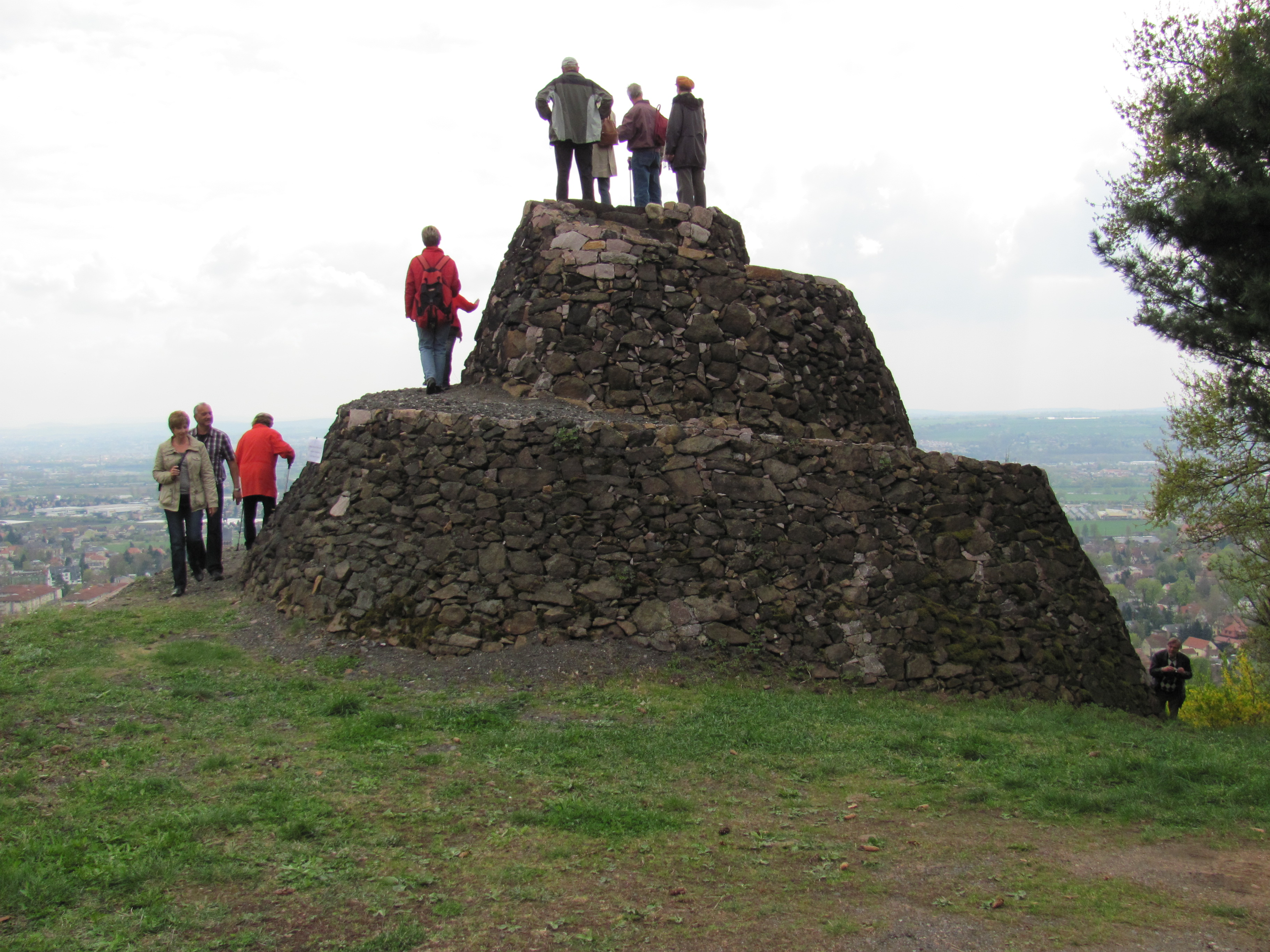 Radebeul, Cikkurat von der Rückseite aus gesehen fotografiert am "6. Tag der Offenen Aussicht" in Radebeul